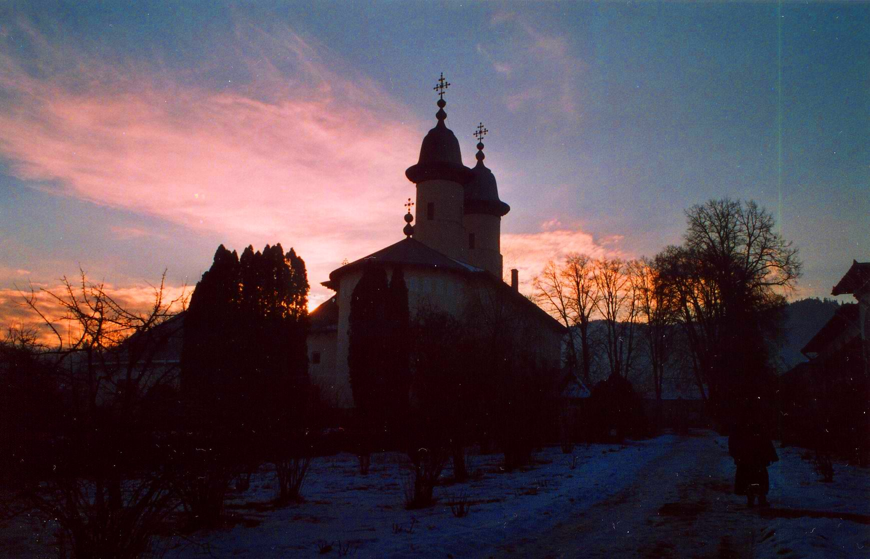 Mănăstirea Văratic